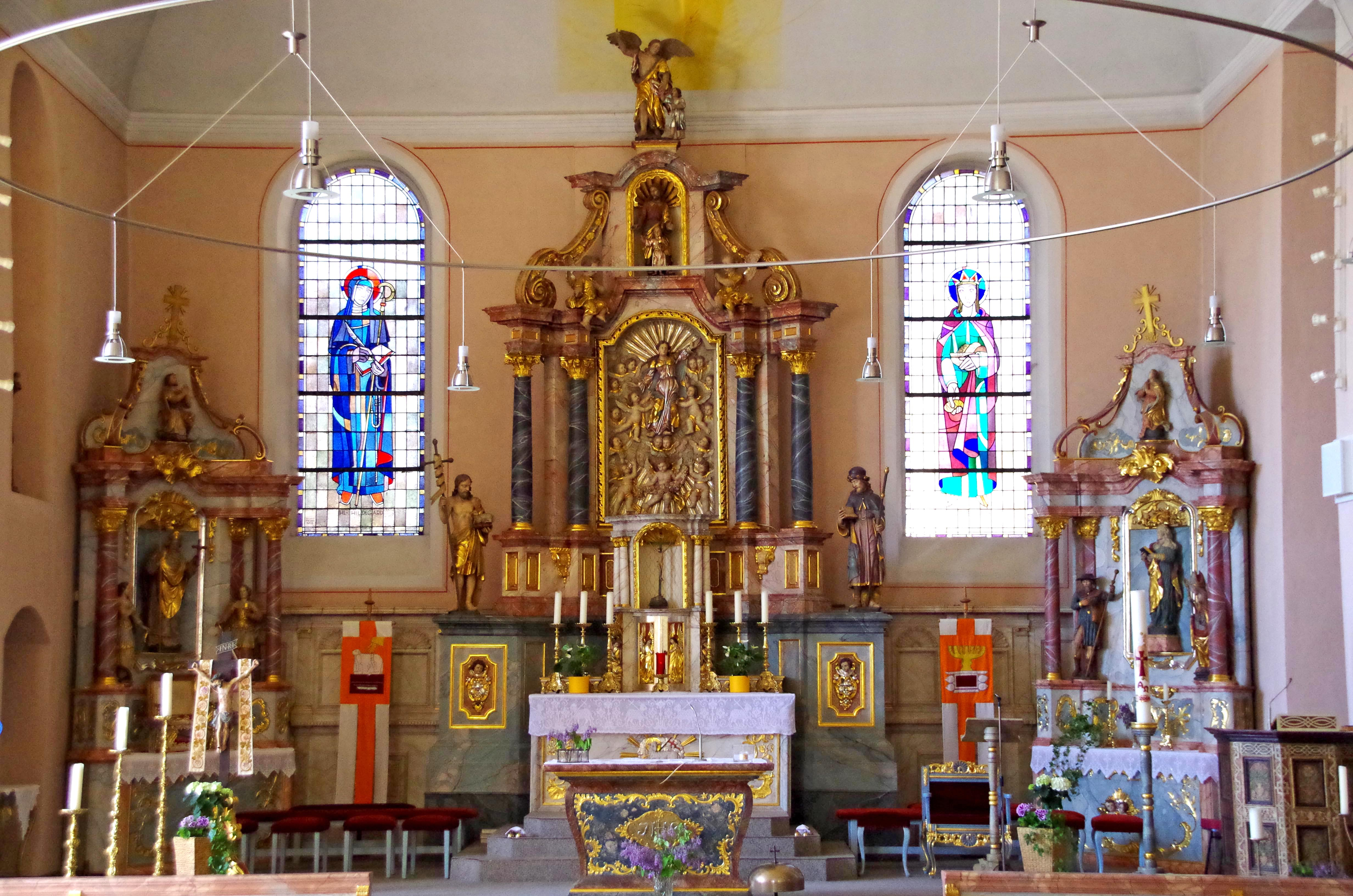 Waxweiler, Katholische Pfarrkirche St. Johannes Baptist, Chorraum